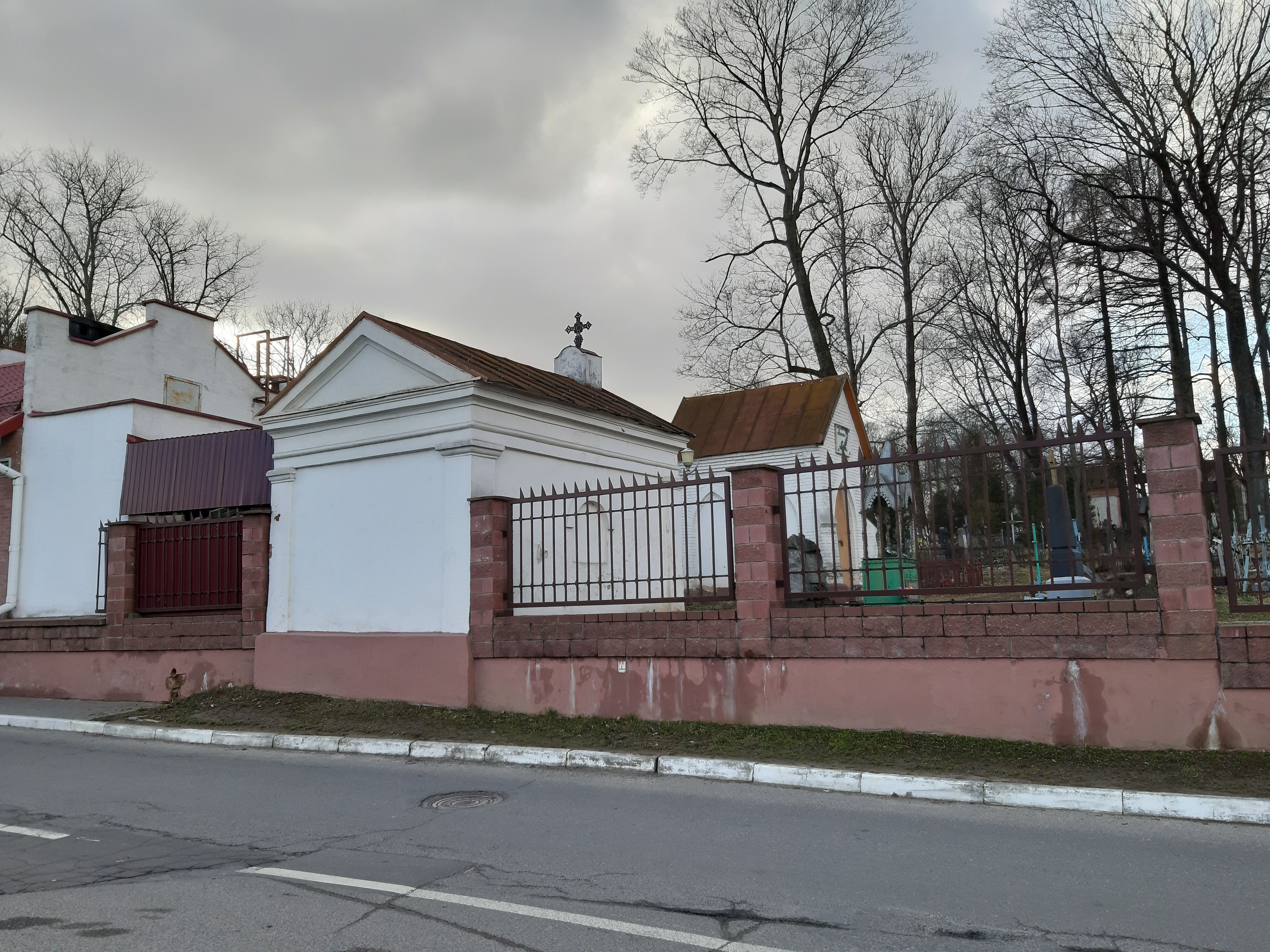 Мінск. Кальварыйскія могілкі. 2020